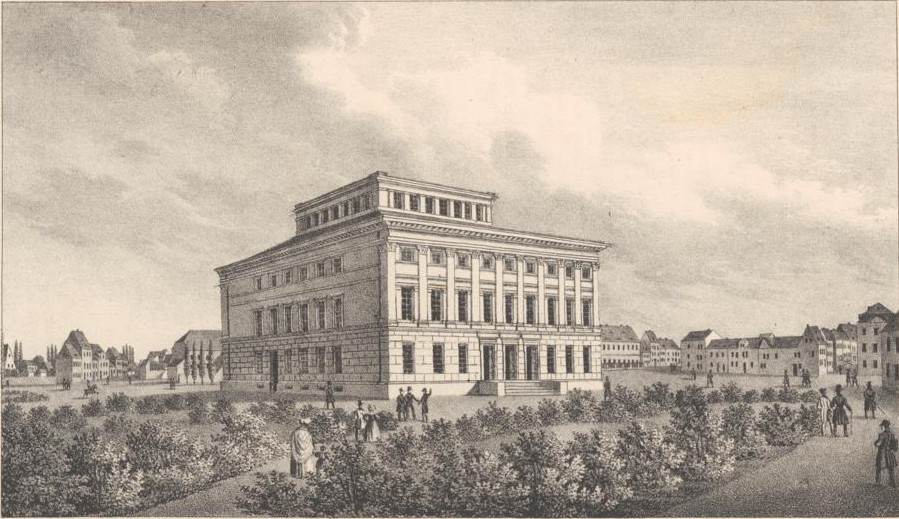 Das Universitätsgebäude in Halle, Lithographie : 20 x 12 cm, Heinrich Wilhelm Teichgräber